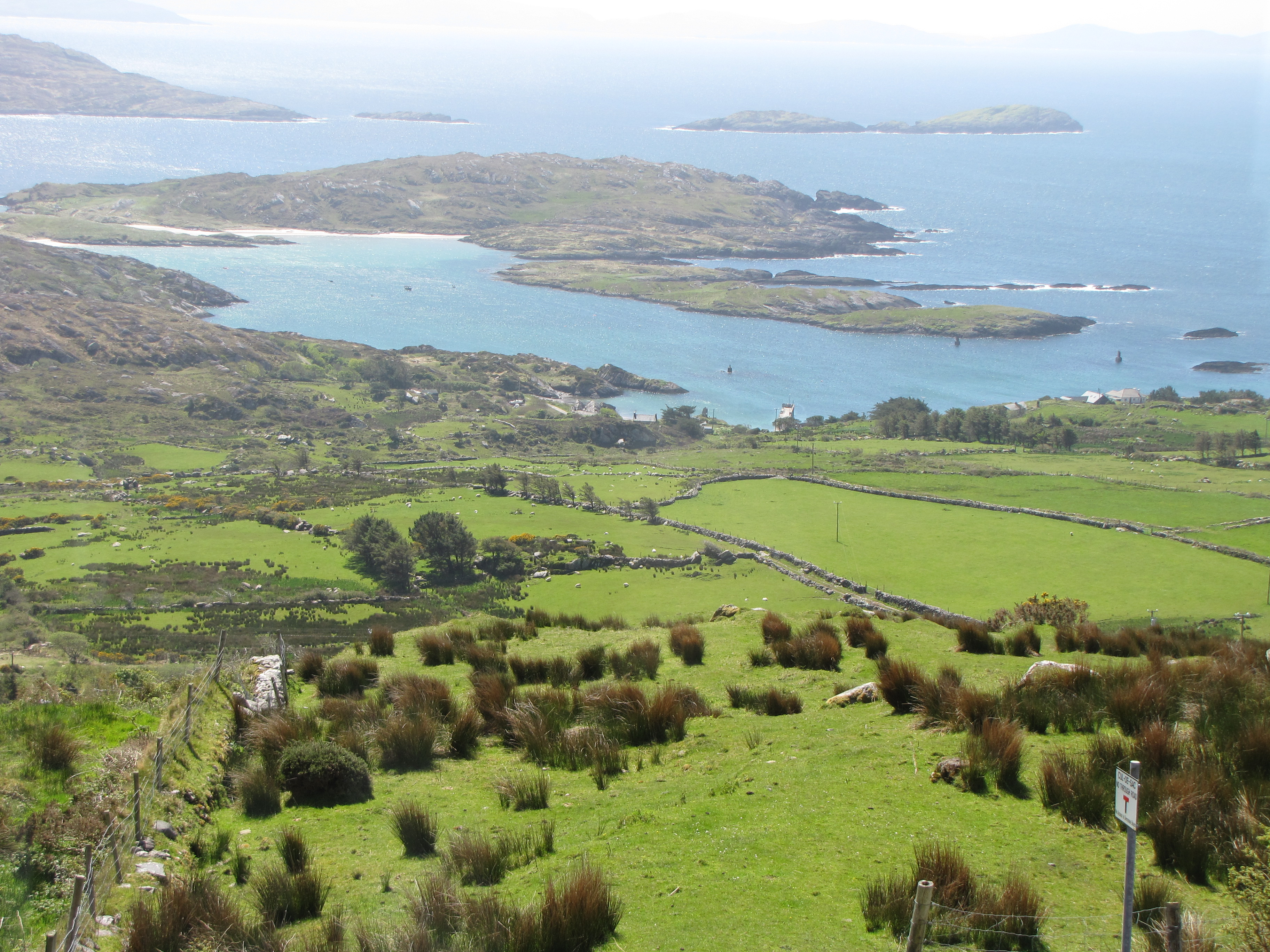 Derrynane Bay är en bukt i sydvästra Irland.